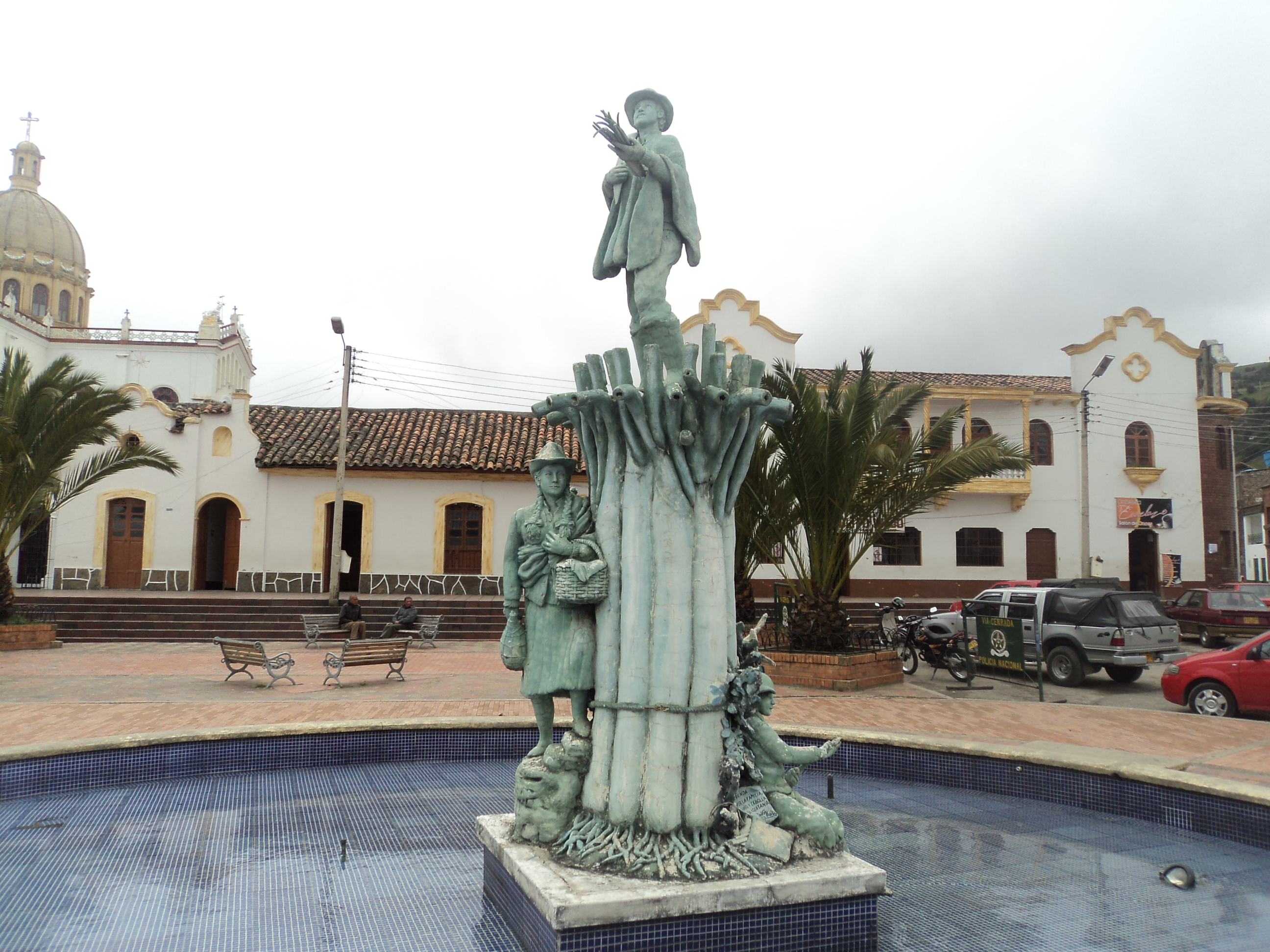 Parque principal de Aquitania